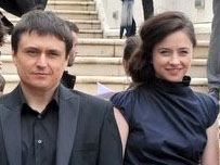 Le réalisateur et les comédiennes de Au-delà des collines au festival de Cannes